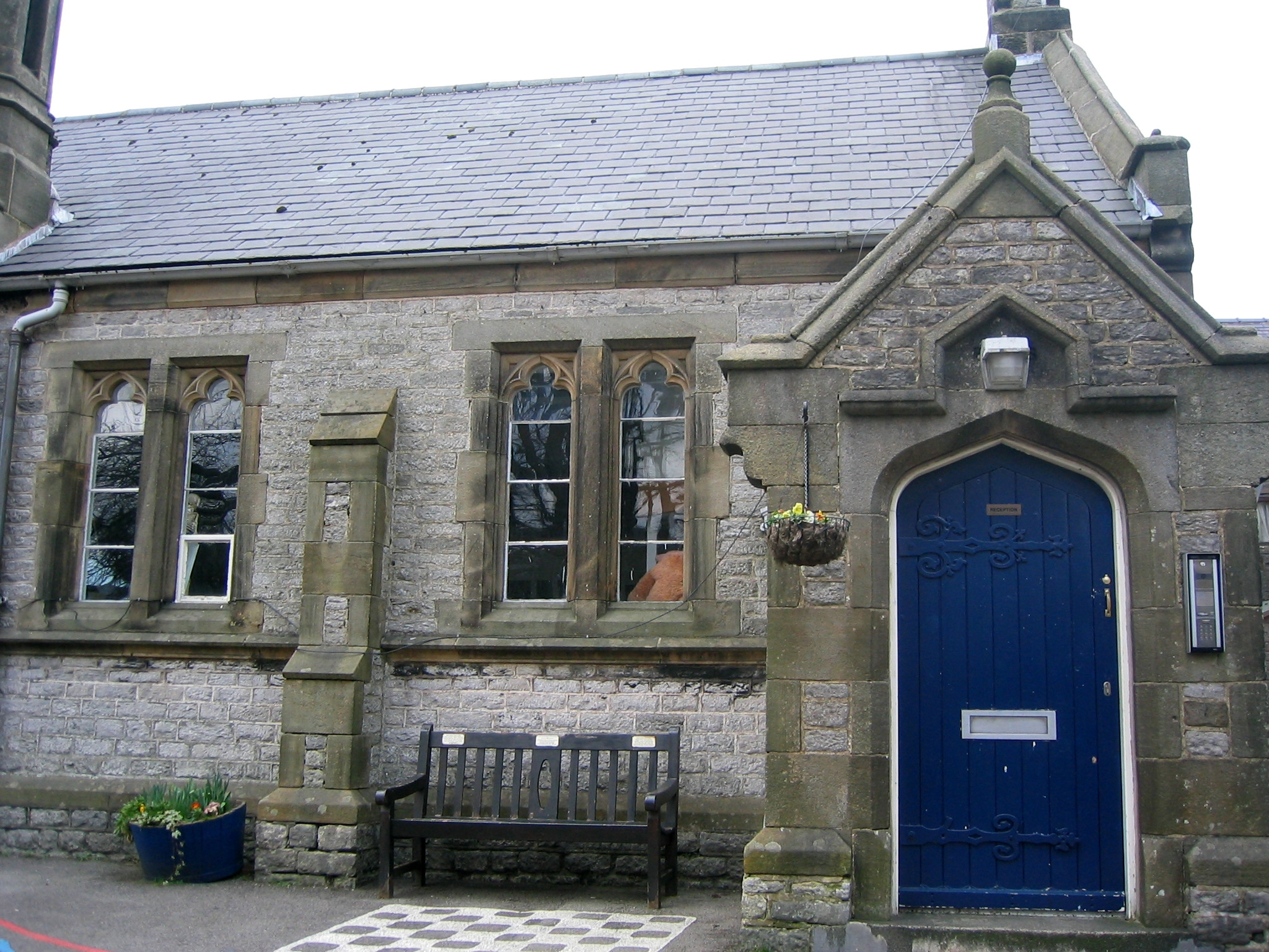 Esta es la escuela primaria de Castleston